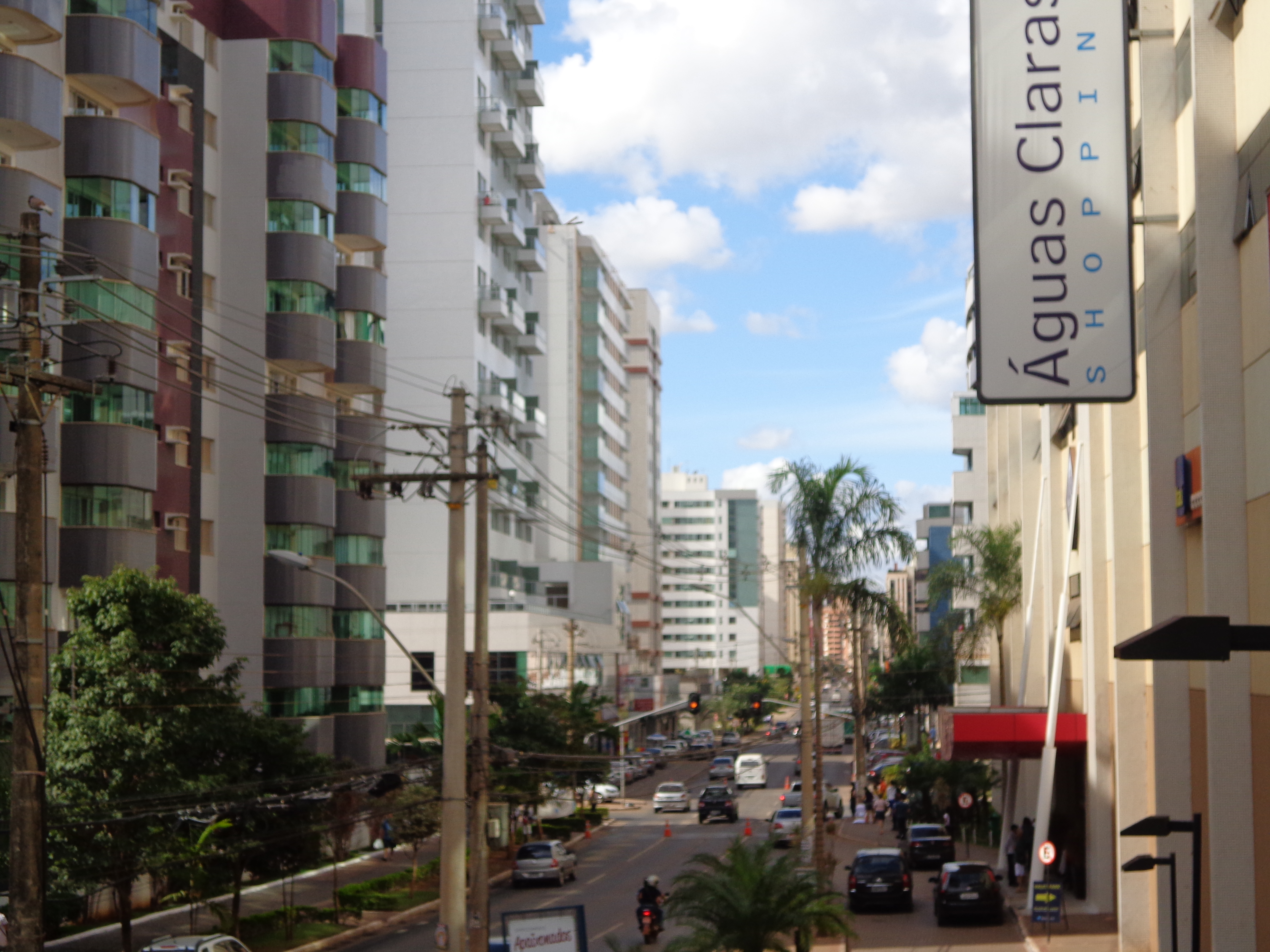 Aguas Claras DF Brasil - Av Castanheiras